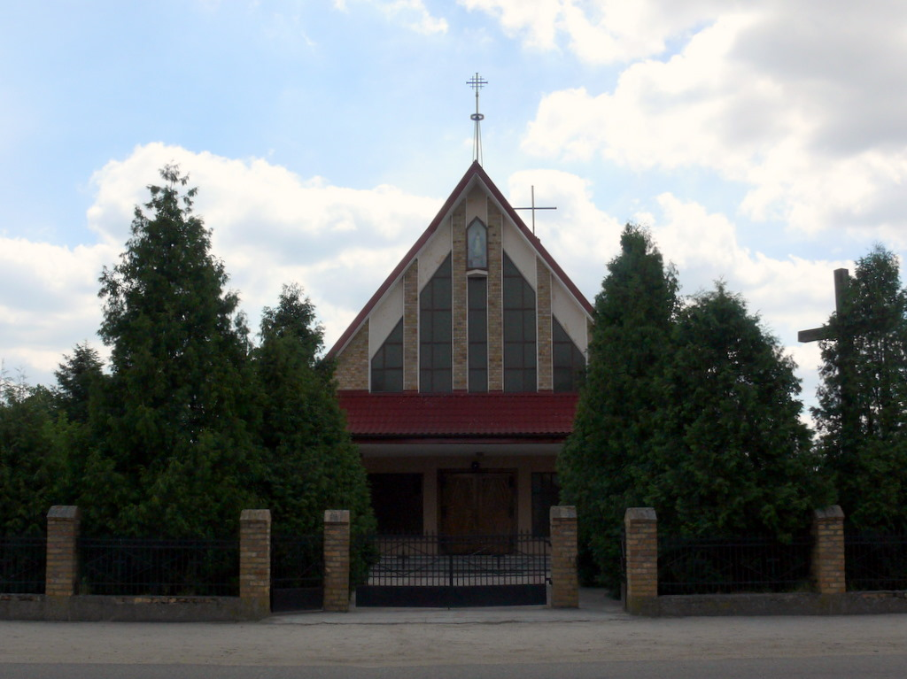 Kościół parafialny w Ochlach